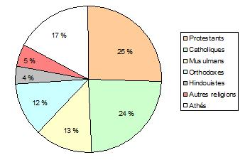 Croyances religieuses, à East York, Toronto (province de l'Ontario, Canada).